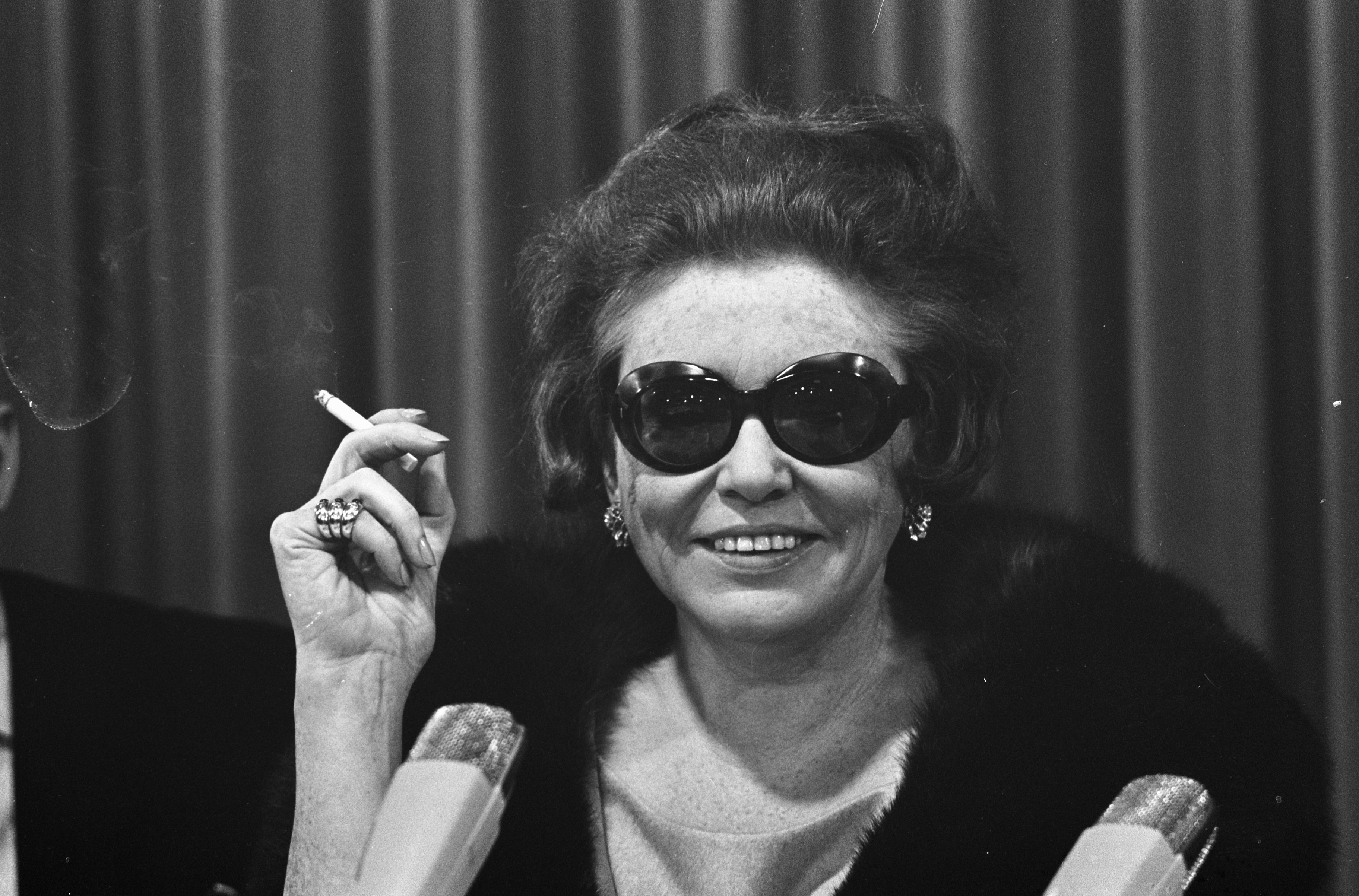 Collectie / Archief : Fotocollectie Anefo Reportage / Serie : [ onbekend ] Beschrijving : Aankomst Zarah Leander (zangeres) op Schiphol. Zarah Leander Datum : 3 oktober 1967 Trefwoorden : aankomsten, zangeressen Persoonsnaam : Zarah, Leander Fotograaf : Kroon, Ron / Anefo Auteursrechthebbende : Nationaal Archief Materiaalsoort : Negatief (zwart/wit) Nummer archiefinventaris : bekijk toegang 2.24.01.05 Bestanddeelnummer : 920-7539